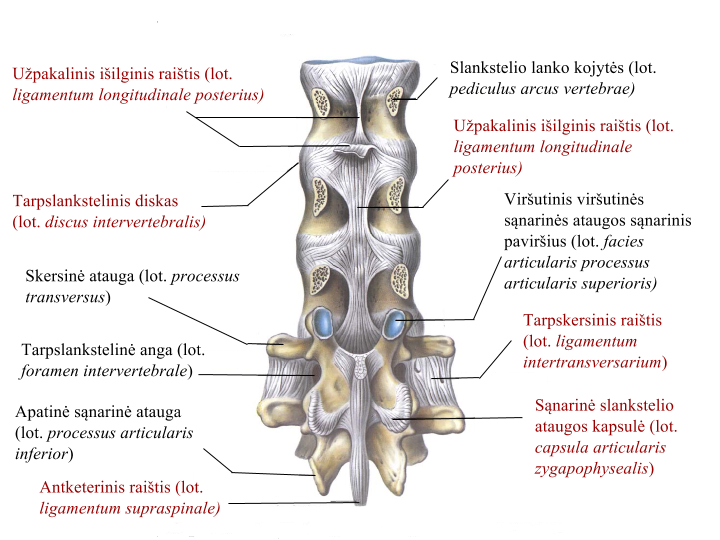 Stuburo raiščiai iš priekio